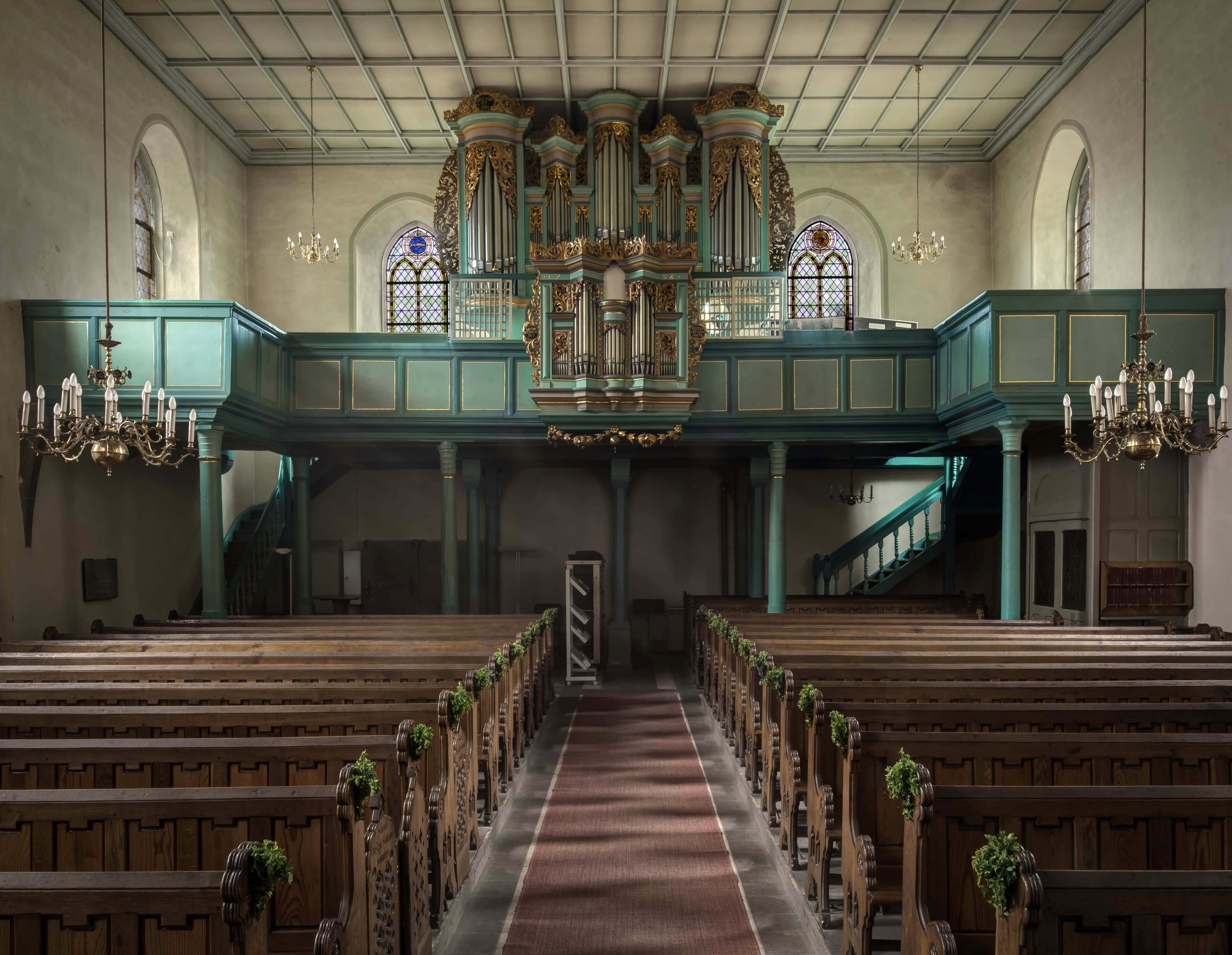 Bad Sooden-Allendorf, Orgel in St. Marien